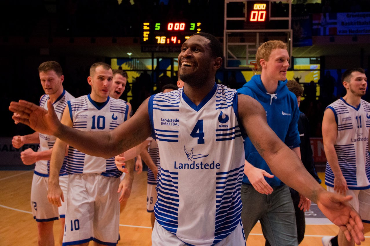 Buzzerbeater wat de winst opleverde tegen Donar Groningen